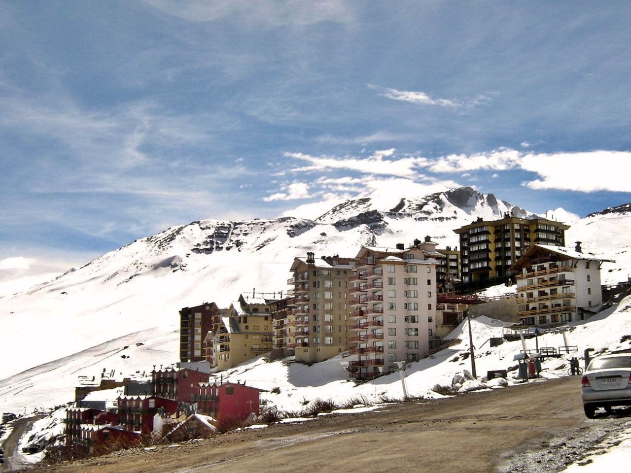 Centro de Ski El Colorado, al oriente de Santiago de ChileEl Colorado